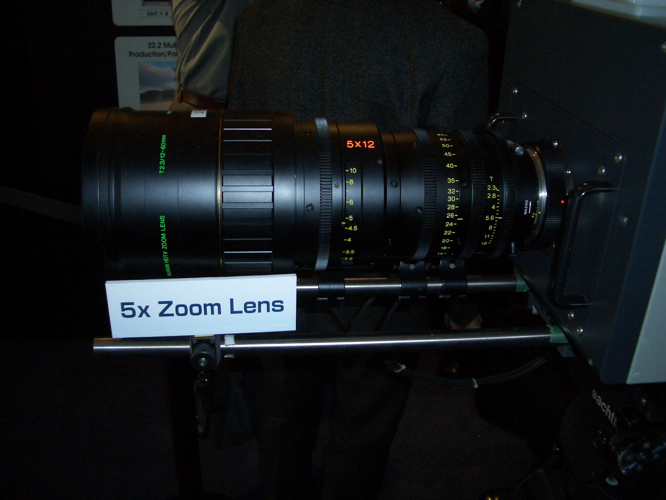 Fujinon U-HD Linse